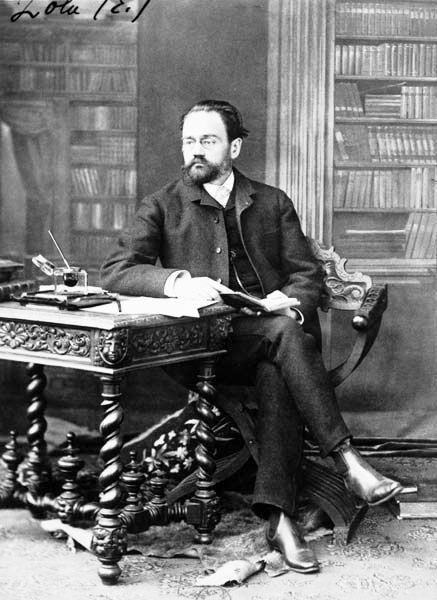 Emile Zola ca 1870